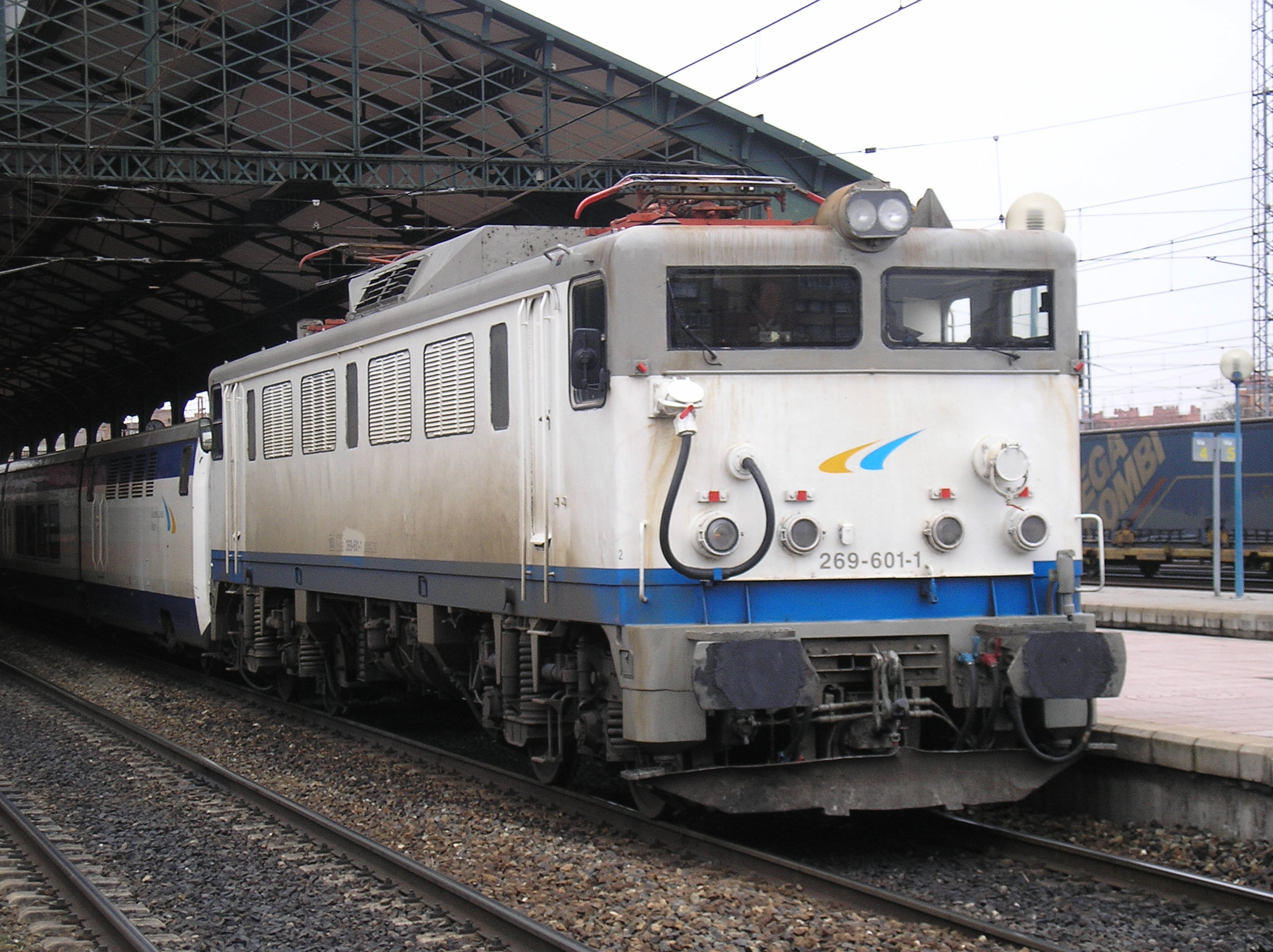 Locomotora eléctrica de la serie 269 (269.601.1) estacionada en Valladolid.